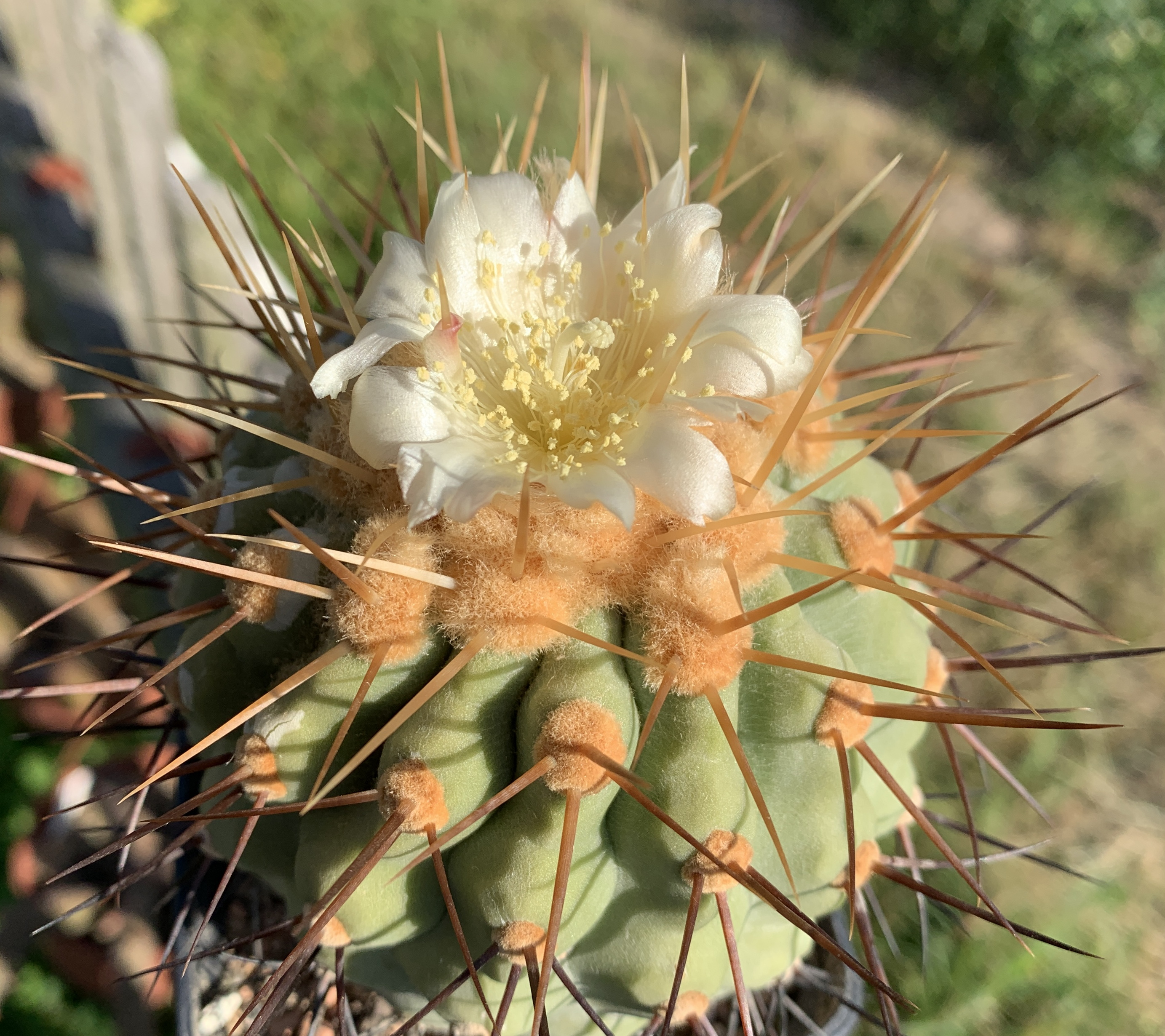 Copiapoa haseltoniana, in Blüte